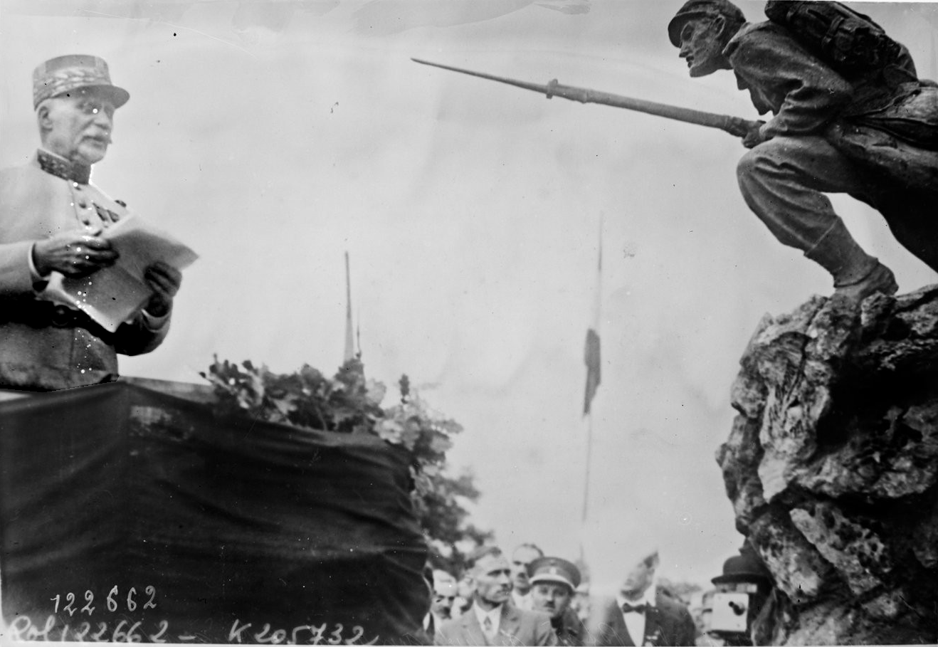 Maréchal Pétain (1927) - inauguration du monument l'Assaut à Dinant